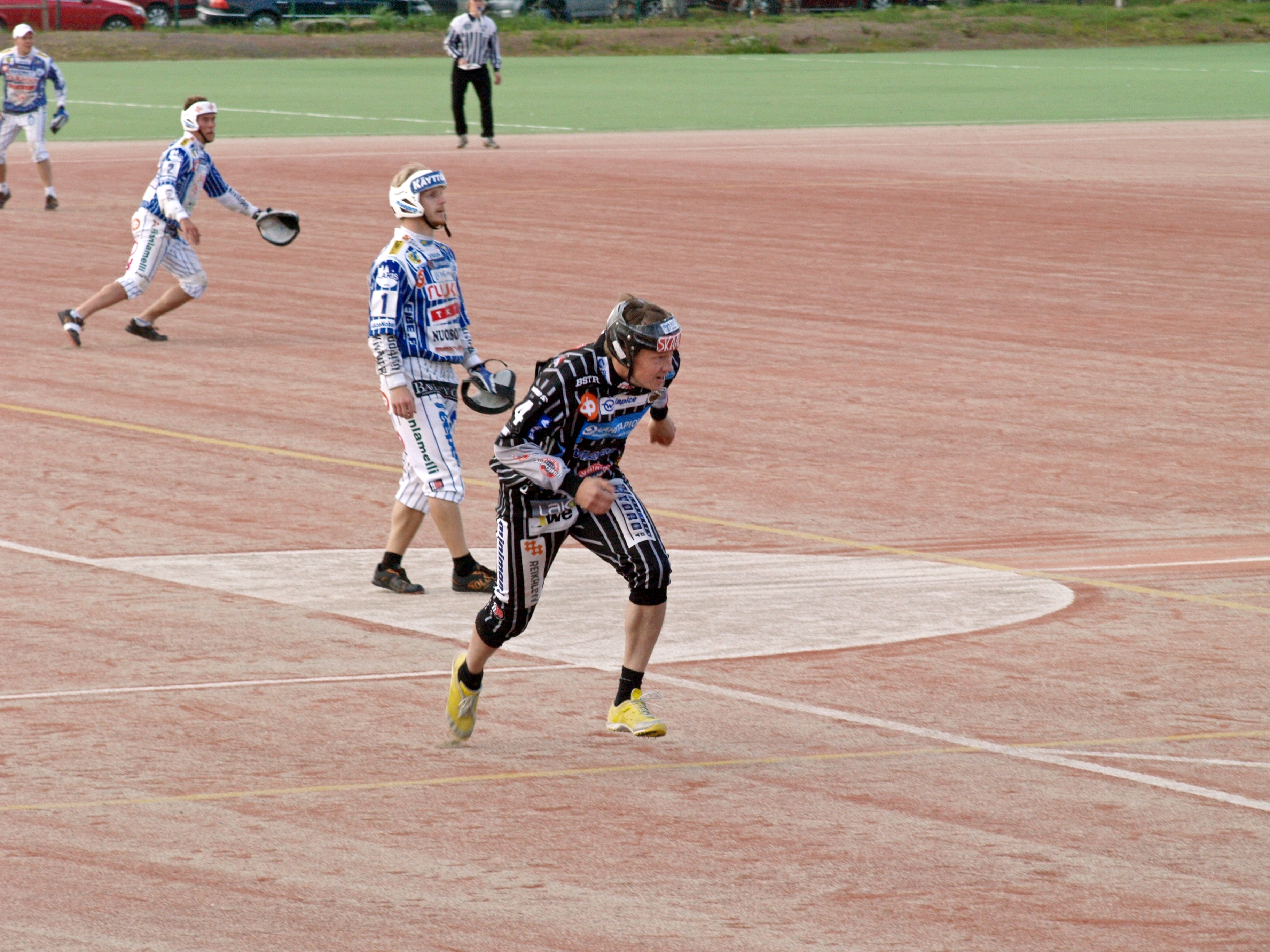 JymyJussit - Vimpelin Veto pesäpallo-ottelu 21.7.2015.